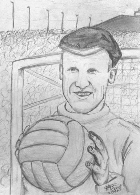 Retrato basado en el futbolista inglés Bert Williams, en su época de portero durante su juventud, es una obra inédita realizada a partir de su fallecimiento y para poder ilustrar su artículo en Wikipedia. Realizado en papel bond A4 con lápiz.